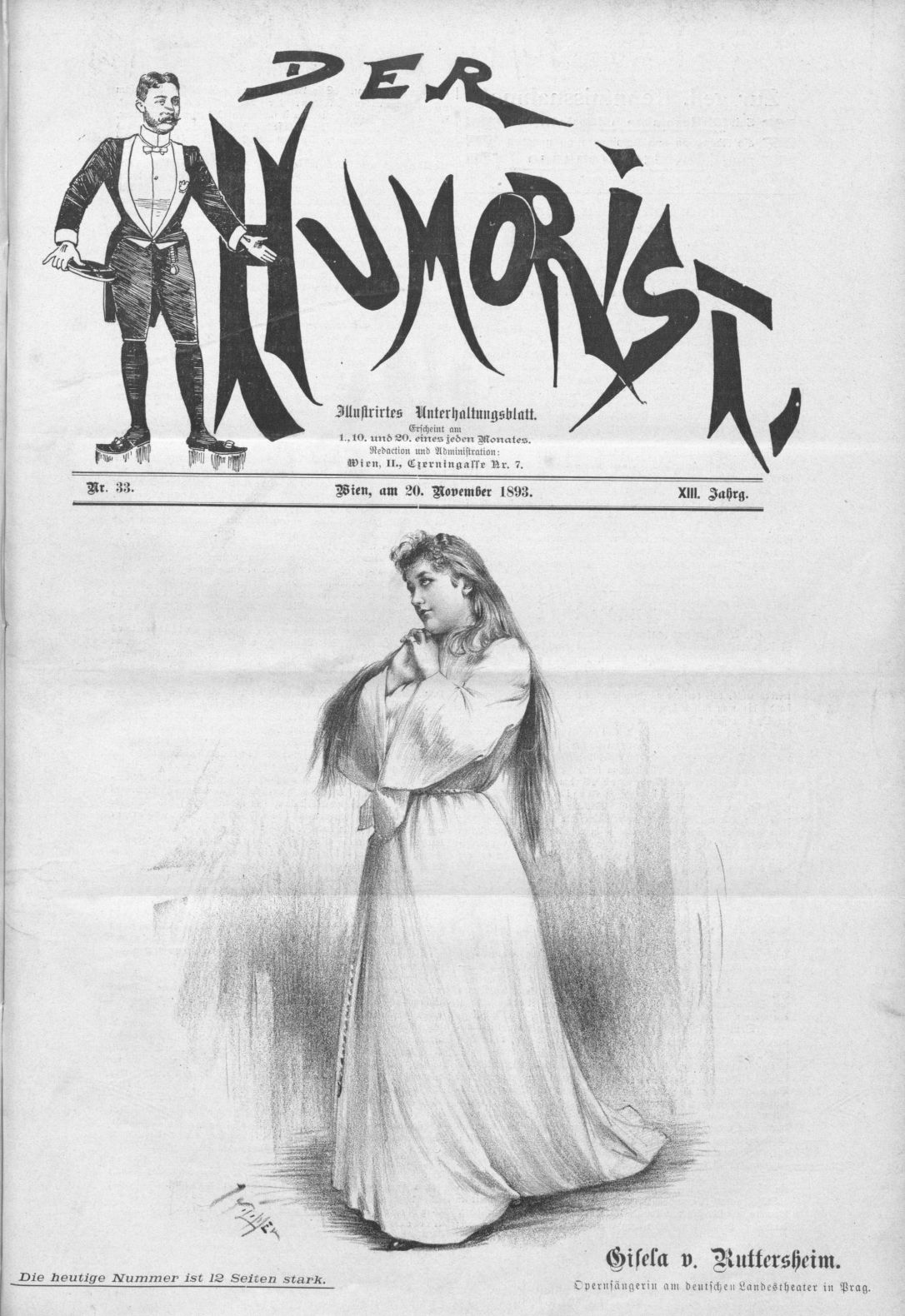 Jan Vilímek Gisela von Ruttersheim in Der Humorist 20. November 1893 Jan Vilímek Gisela von Ruttersheim Der Humorist 1893